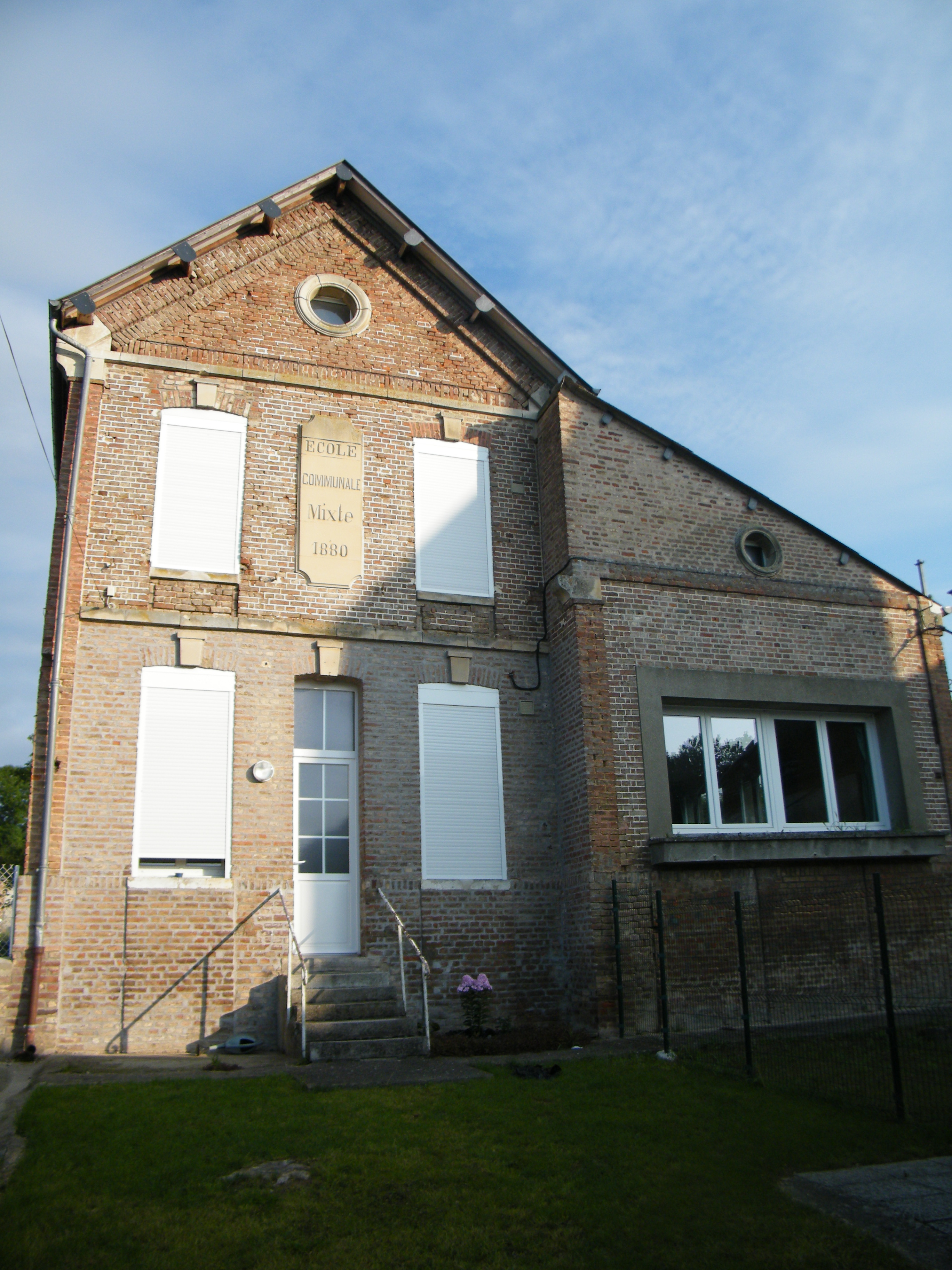 école.